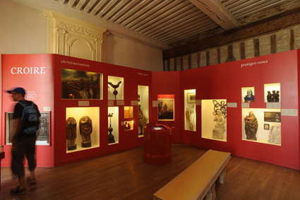 Musée comtois, salle Croire